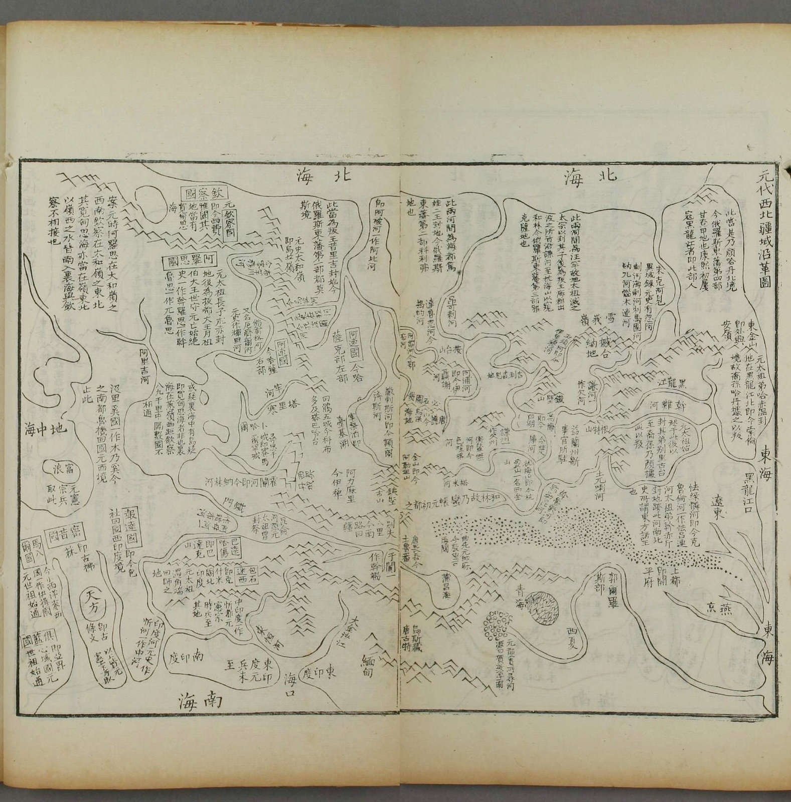 《海國圖志》卷三：元代西北疆域沿革圖